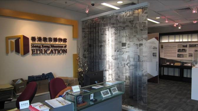 香港教育博物館內部